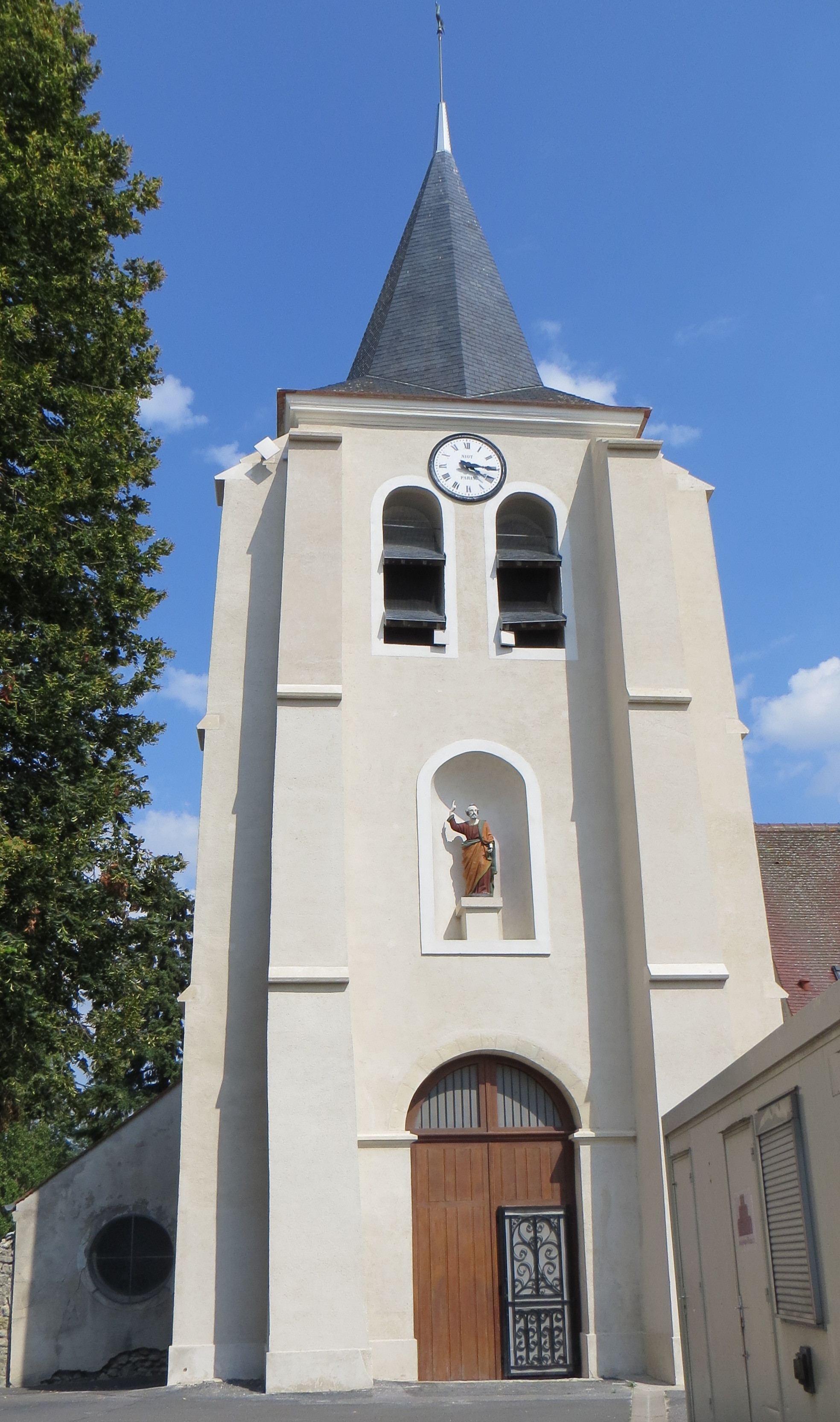 Clocher de l'église